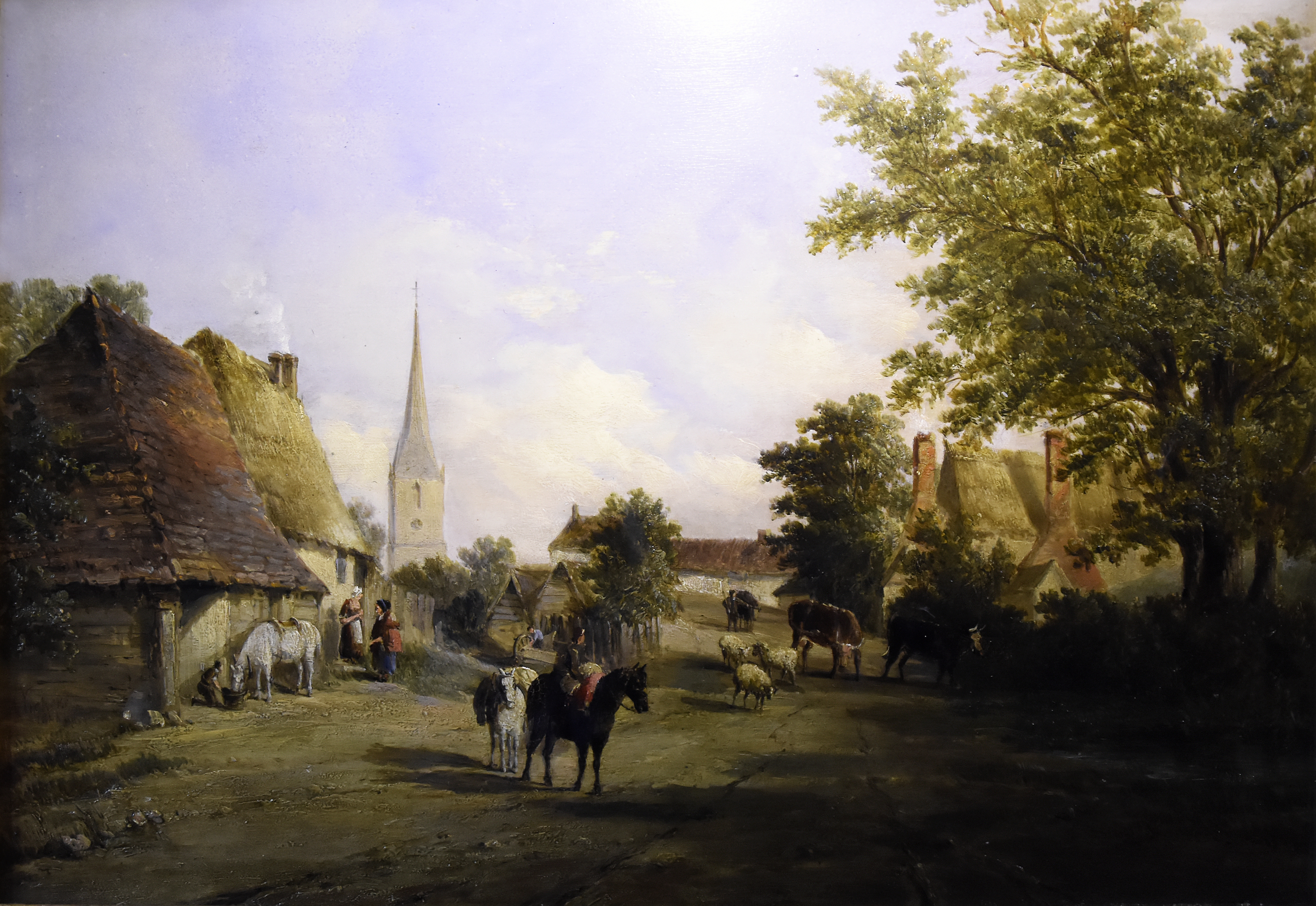 Alfred Vickers (1810-1837) Het dorp Hever - Hever Castle